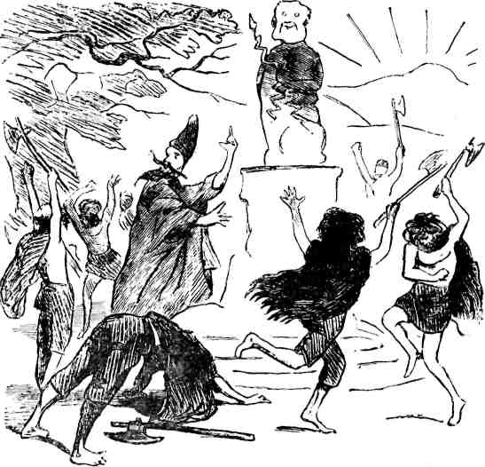 А.И. Лебедев. Жертвоприношение Перуну. Одна из иллюстраций к пародии Неизвестных Авторов: «Рогнеда. Иллюстрированная музыкально-драматическая правда в пяти действиях», журнал Искра, 1865 год.